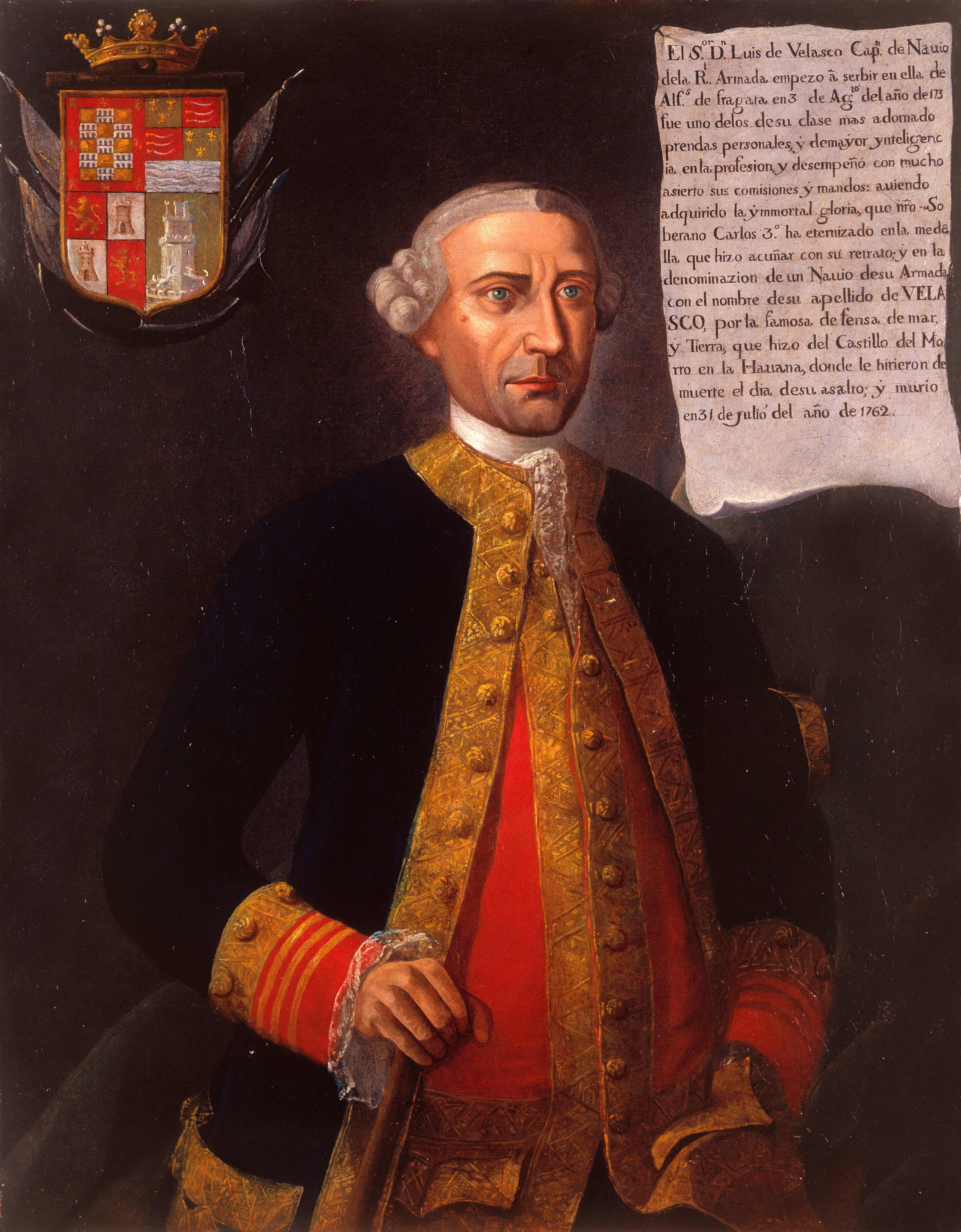 Retrato del marino español Luis Vicente de Velasco (1711-1762), que fue capitán de navío de la Real Armada Española. El cuadro figura en el catálogo del Museo Naval de Madrid de 1853, y fue restaurado en 1993.